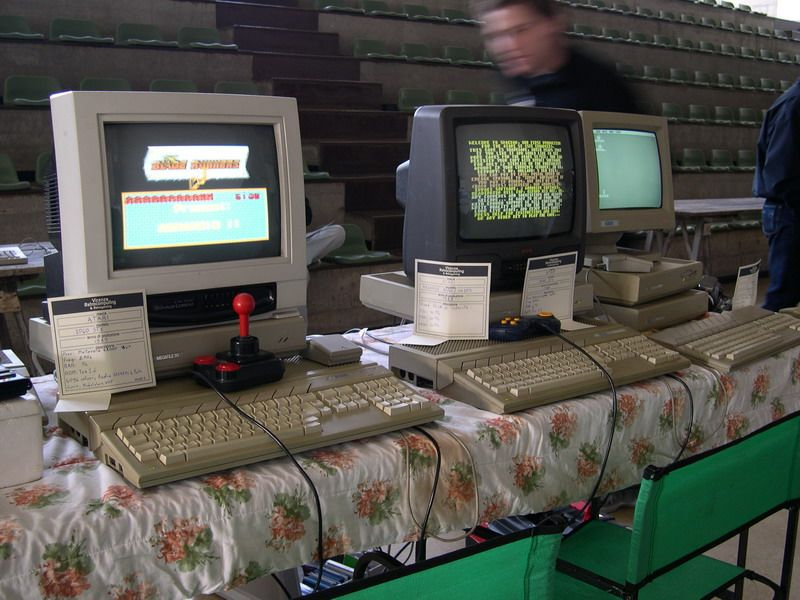 Computer Atari ST durante la manifestazione Vicenza Retrocomputing. L'autore sono io, i computer mostrati sono miei, e rendo pubblica questa foto. Io sono sfuocato sullo sfondo.